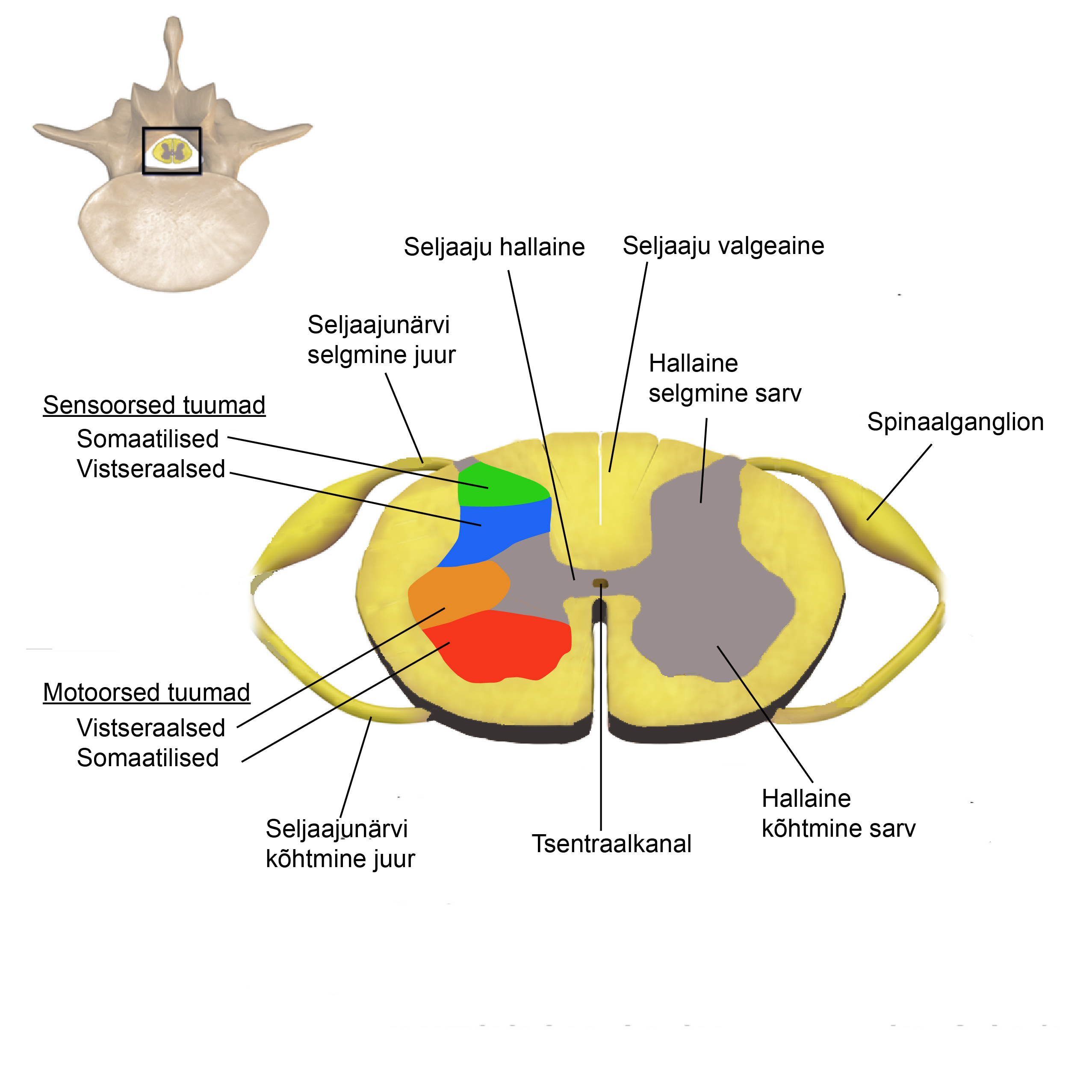 Seljaaju segmendi ristlõige